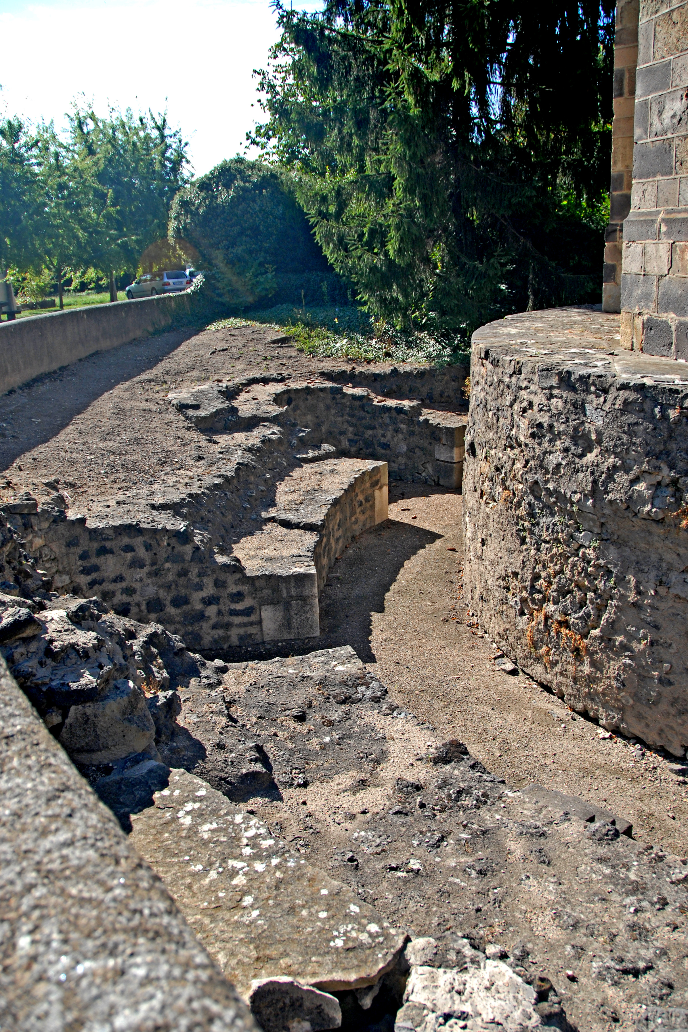 Mozat, Kryptaumgang,von N